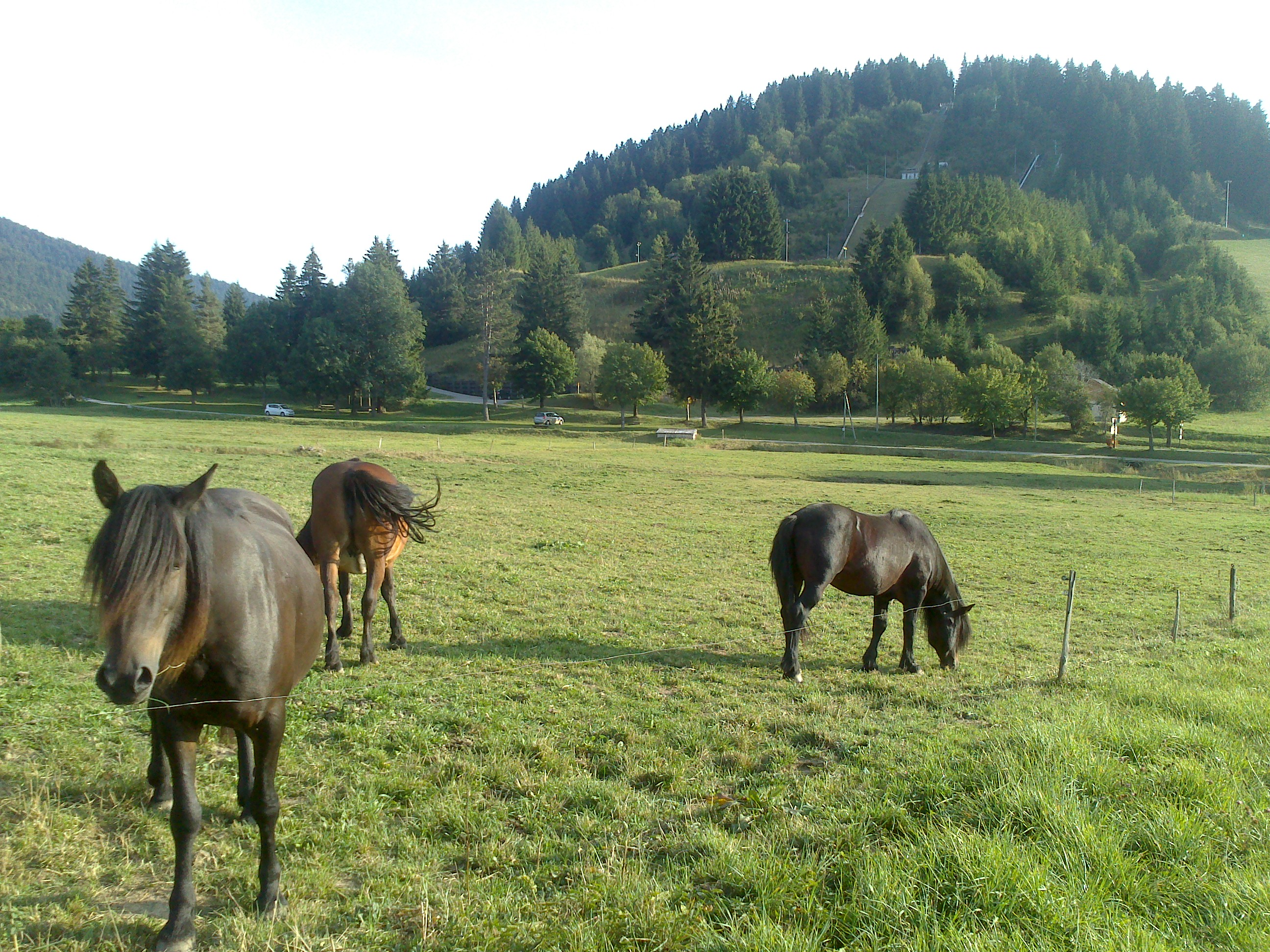 Chevaux Barraquand à Autrans (Isère, Rhône-Alpes, France)